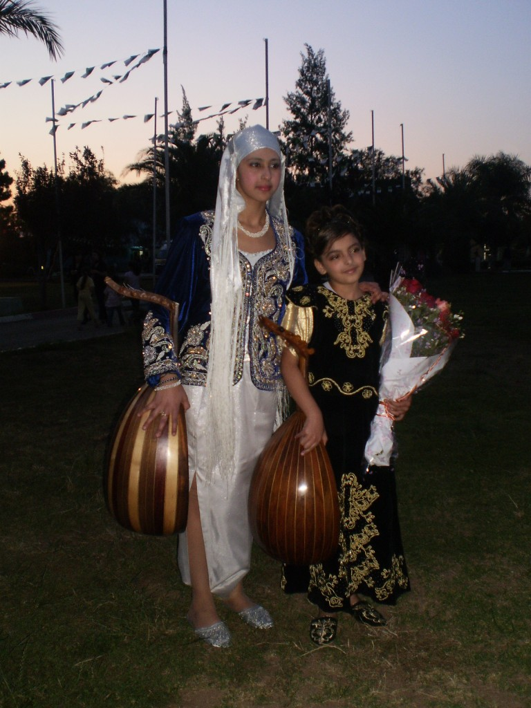 Après le tour de chant de l'école de musique de Riadh El Andalouss